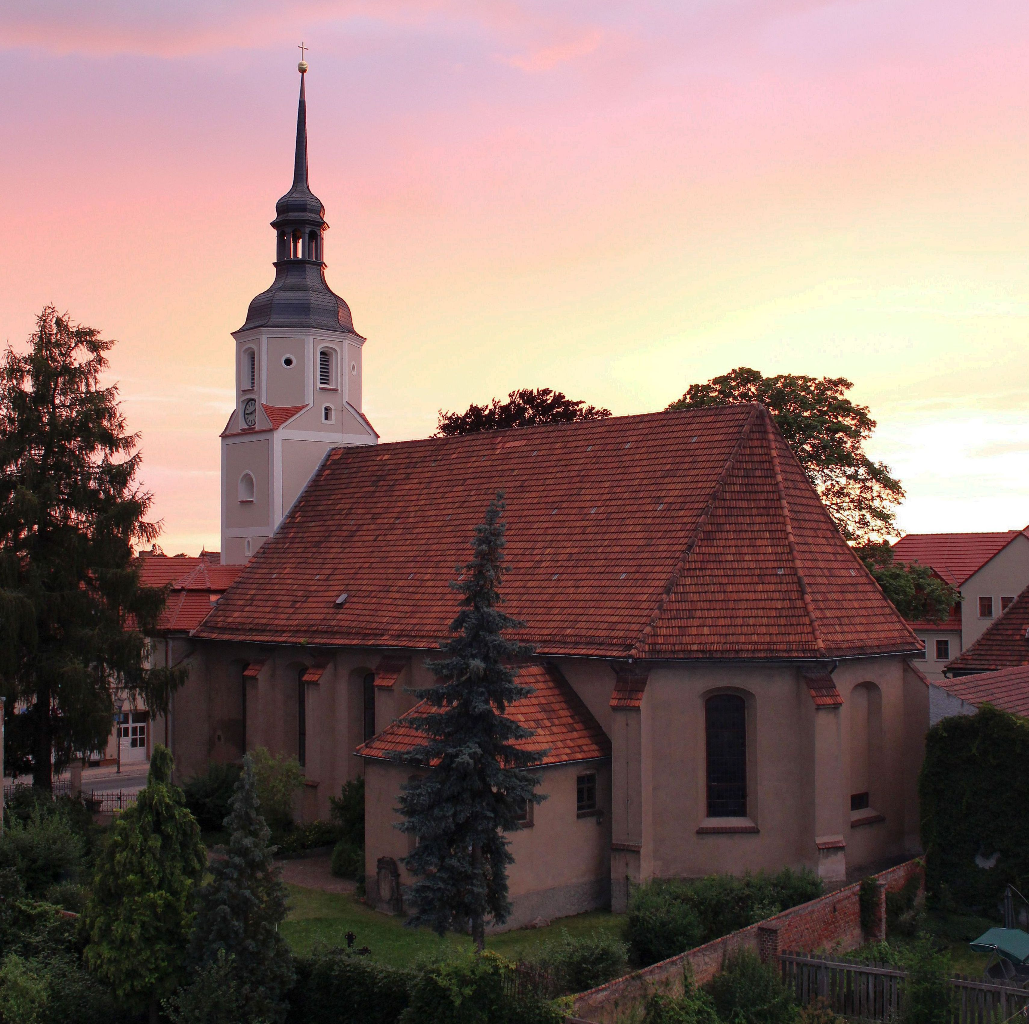 St. Katharina-Kirche in Elsterwerda.